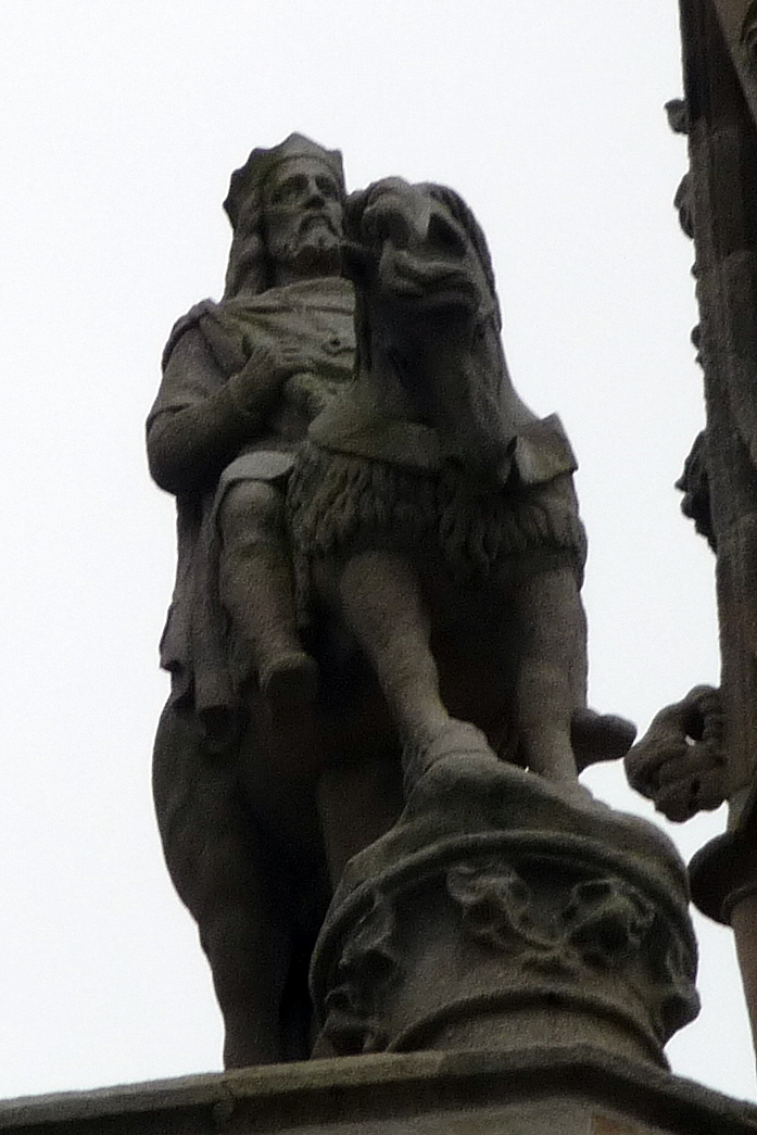 Statue équestre du roi légendaire Gradlon, entre les deux tours de la cathédrale de Quimper